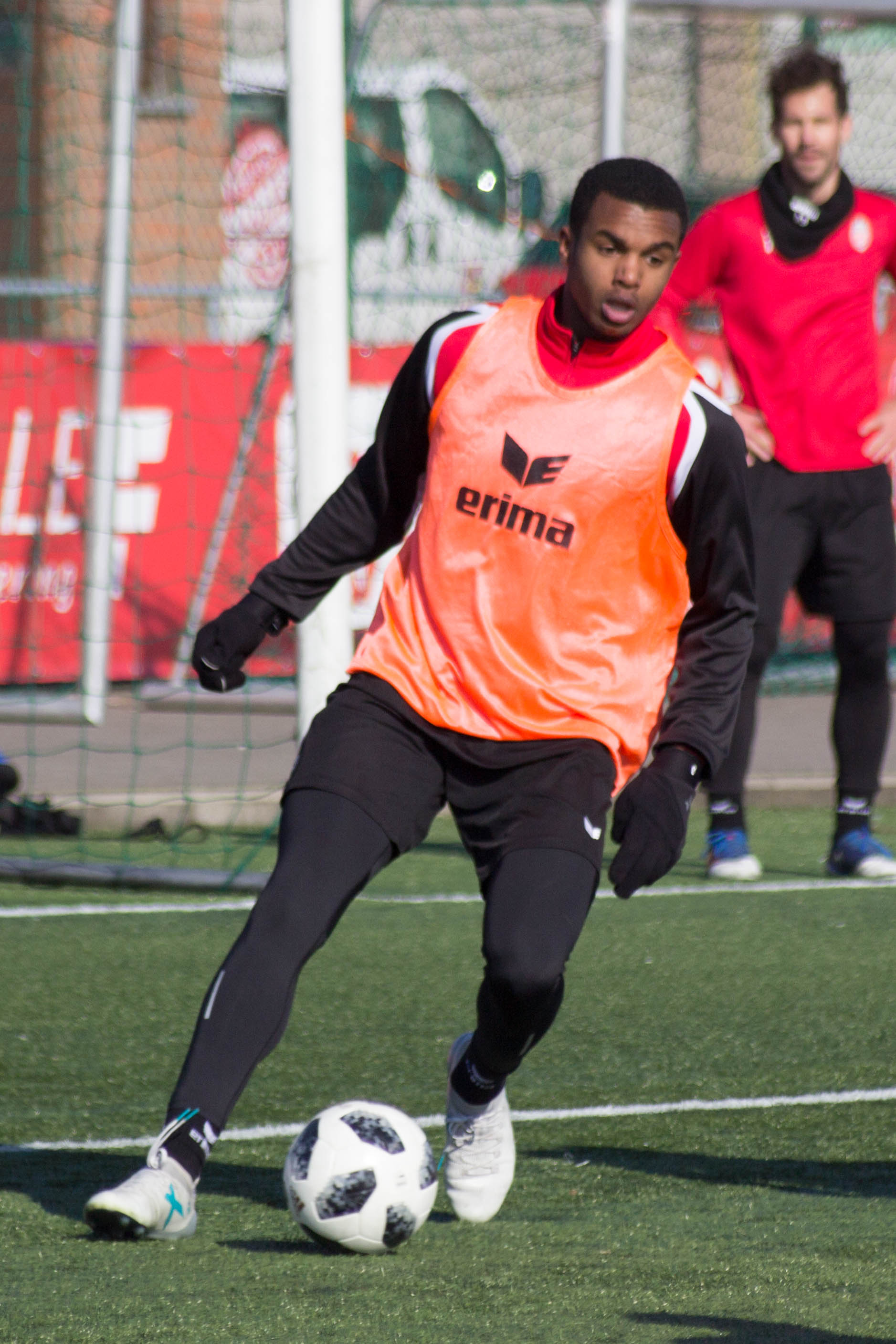 Entraînement du Royal Excel Mouscron, au Futurosport( Mouscron). Le 22 février 2018.